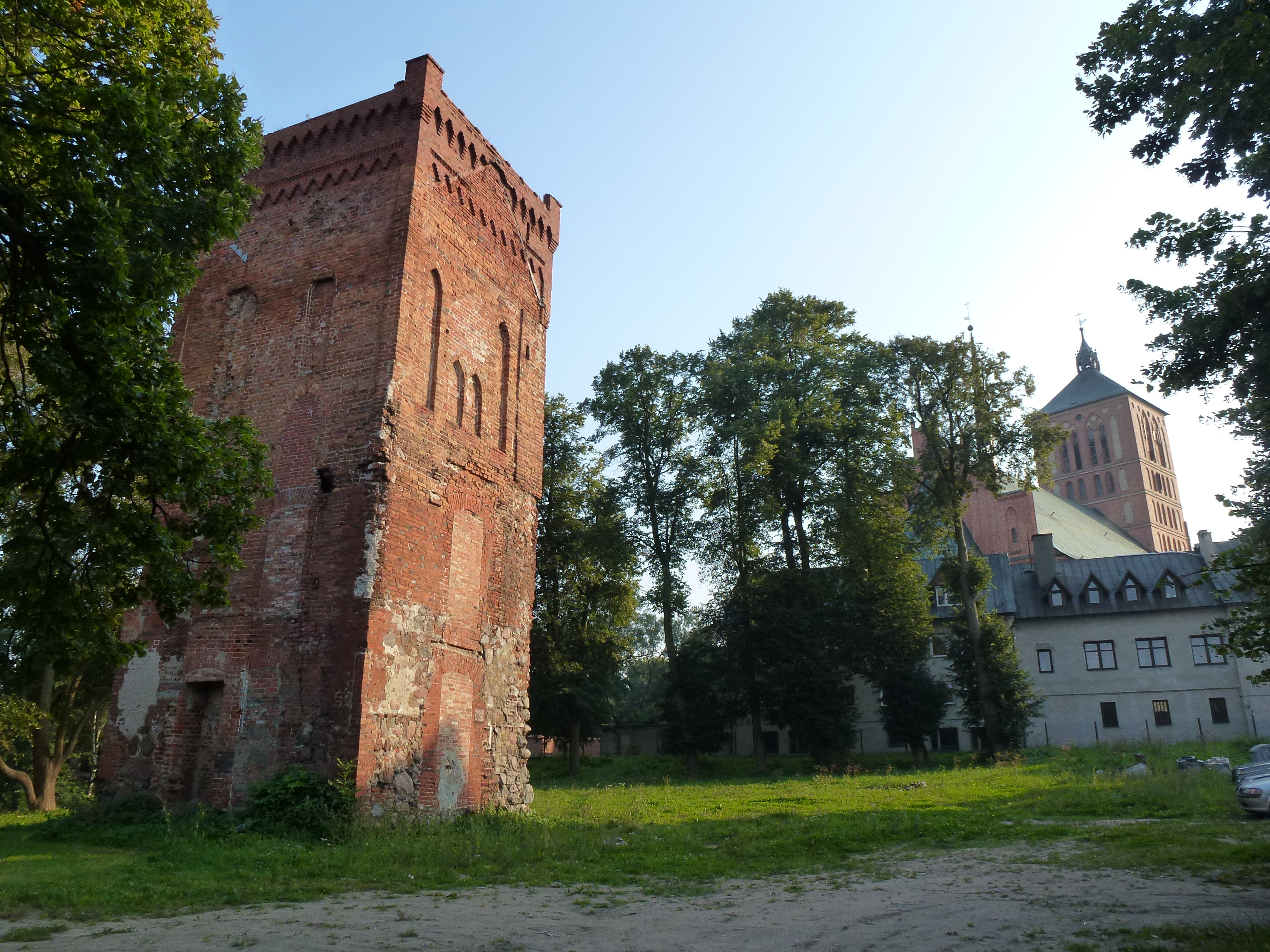 Wieża